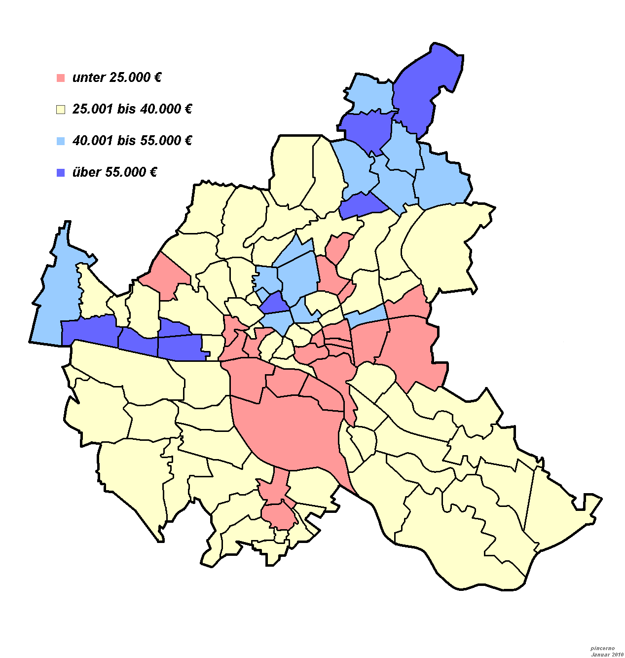 Einkommensstruktur in Hamburg; zu Name und Lage der einzelnen Stadtteile siehe Bezirke in Hamburg und Liste der Bezirke und Stadtteile Hamburgs.